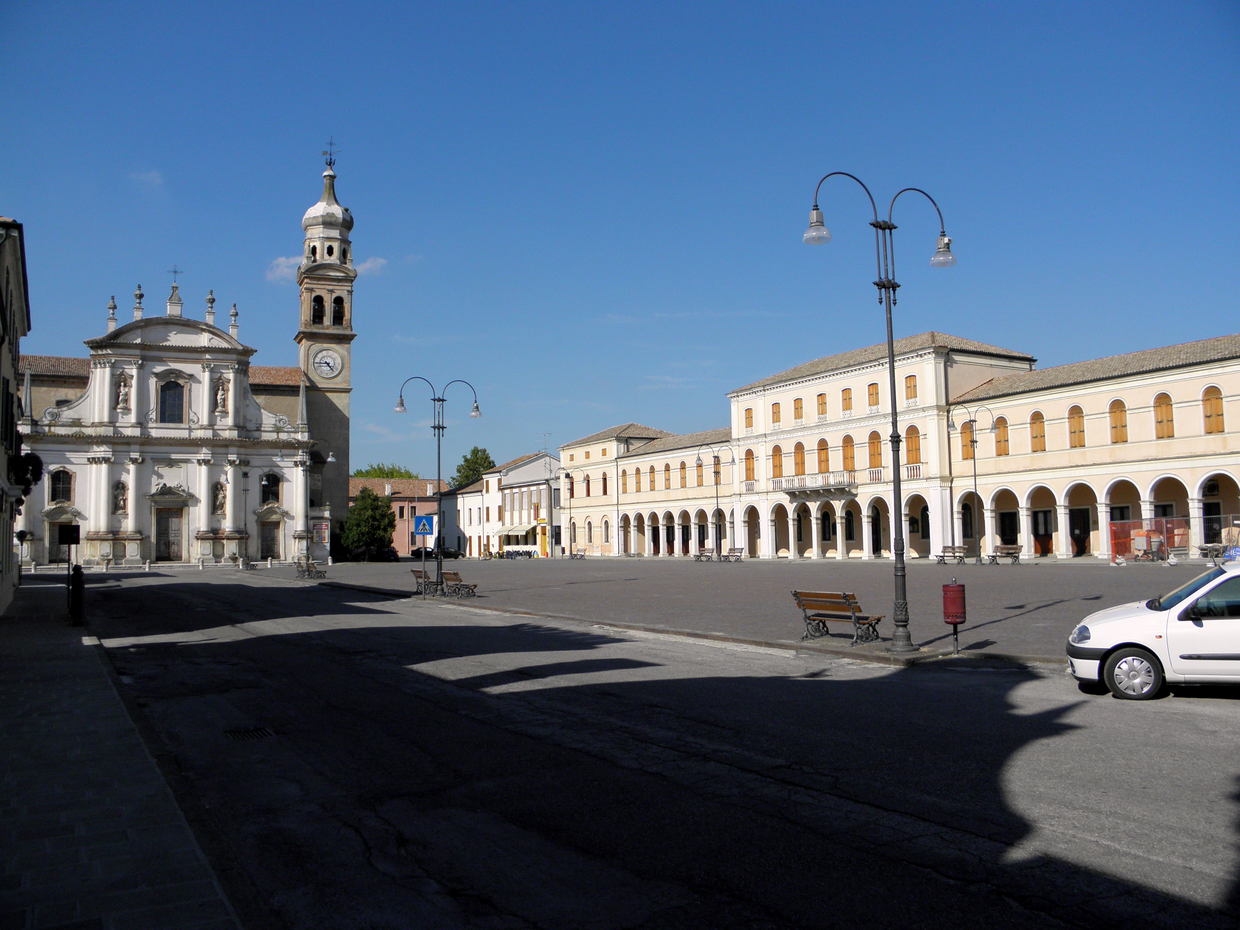 Crespino, la centrale Piazza Fetonte: sulla destra parte del Palazzo Comunale con il suo porticato, sulla sinistra la facciata barocca della chiesa arcipretale dei Santi Martino e Severo, vescovi.